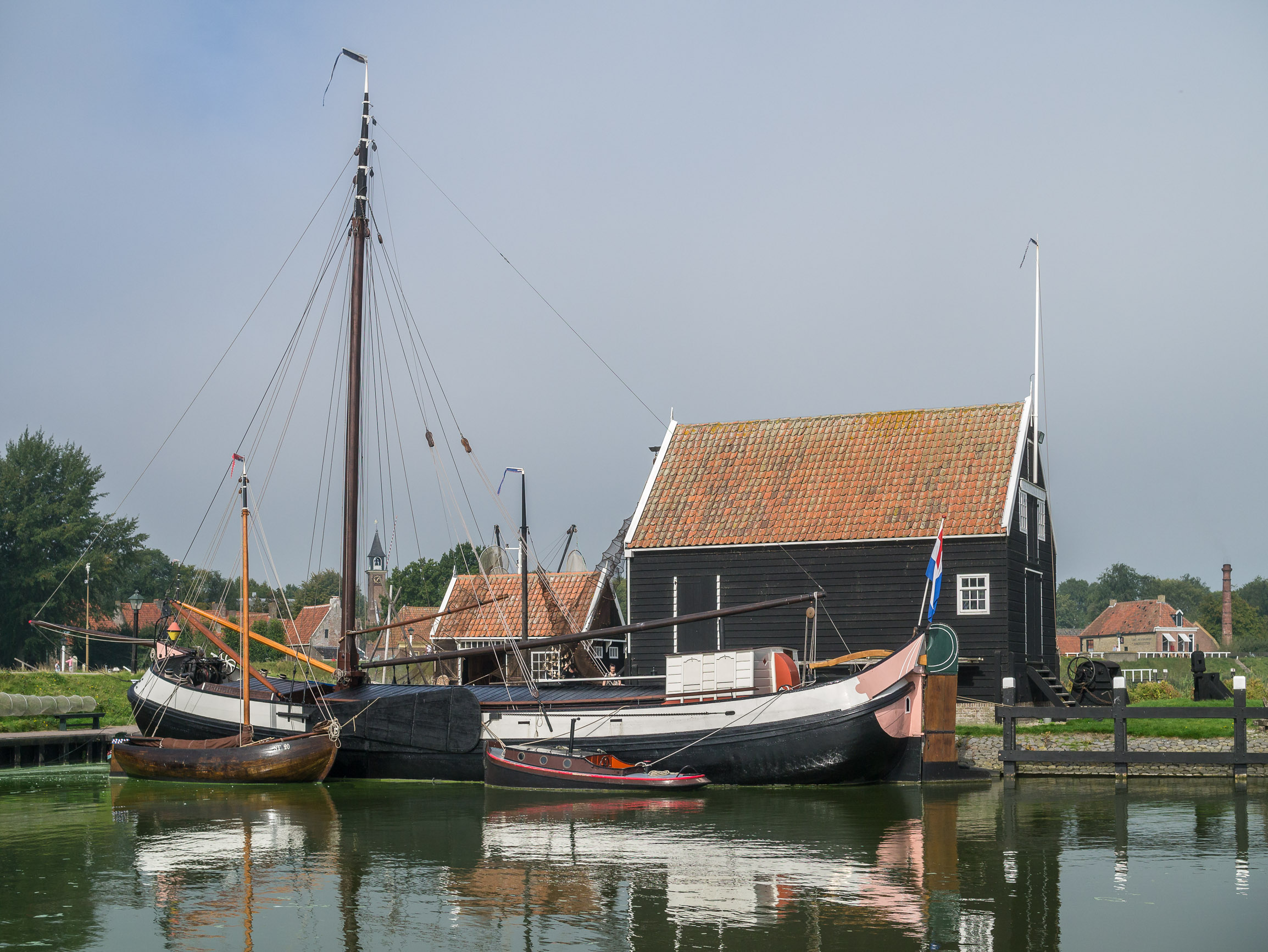 Zuiderzeemuseum Enkhuizen - Haventje van Marken